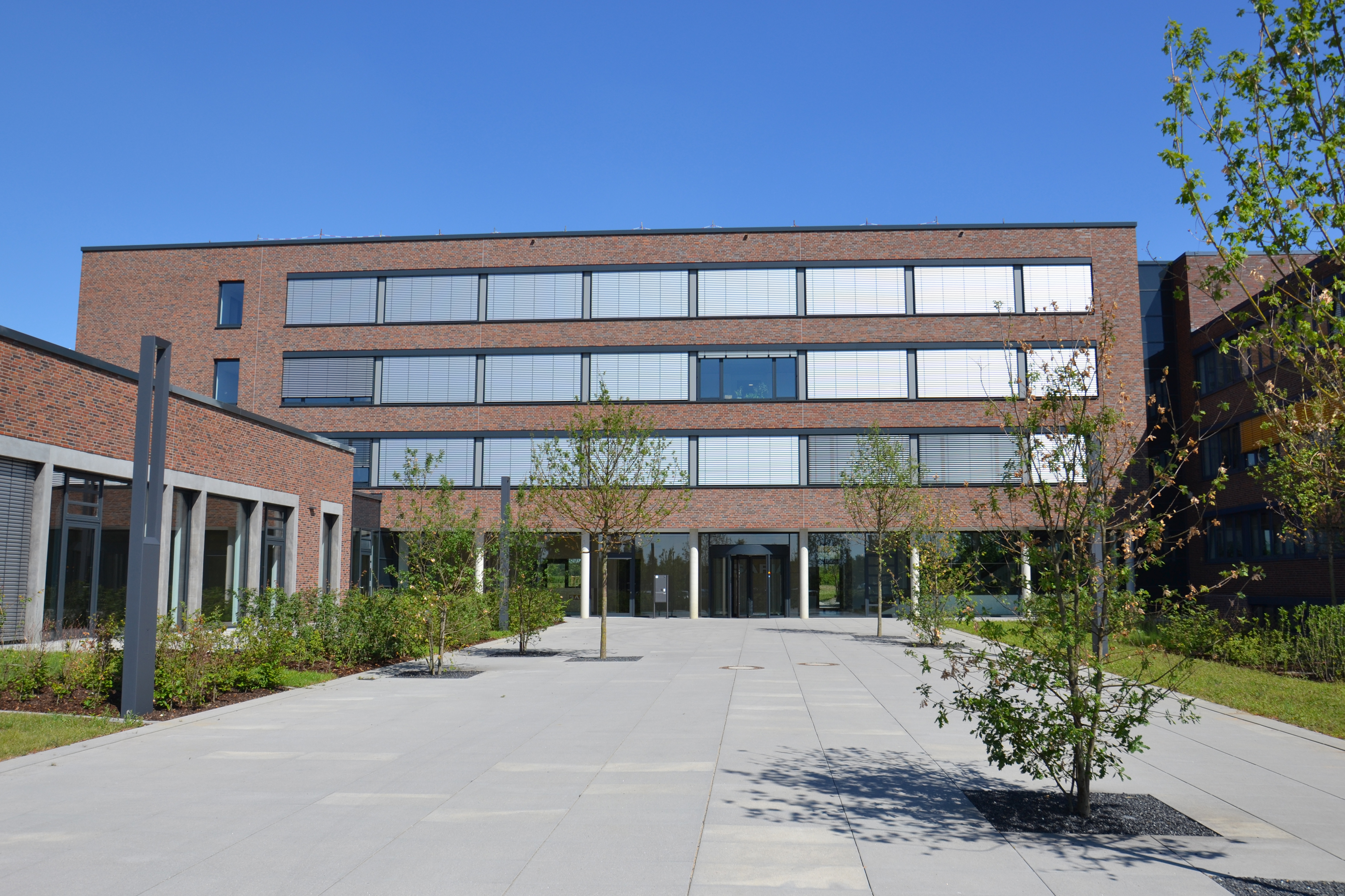 Gebäude der Hauptverwaltung der SARIA-Gruppe in Selm (Westfalen, Deutschland)